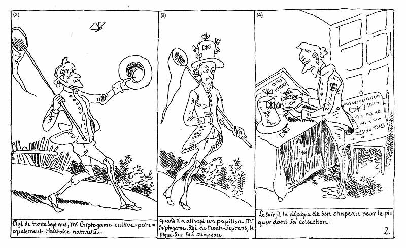 Von Rodolphe Toepffer lithographierte Seite (1845)